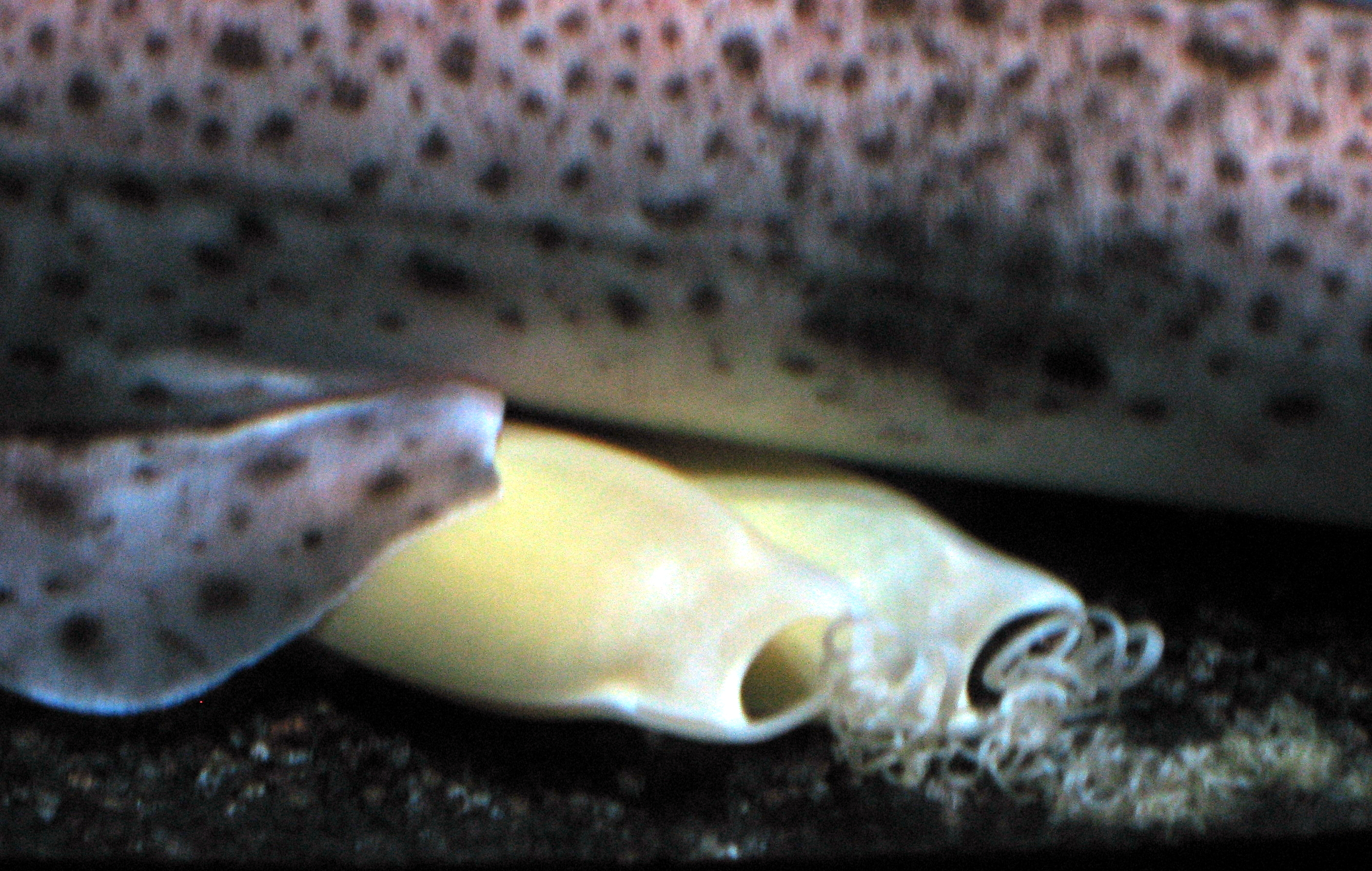 Scyliorhinus canicula eggs in Aquarium Cinéaqua Map: 48° 51' 44" N 2° 17' 27" E